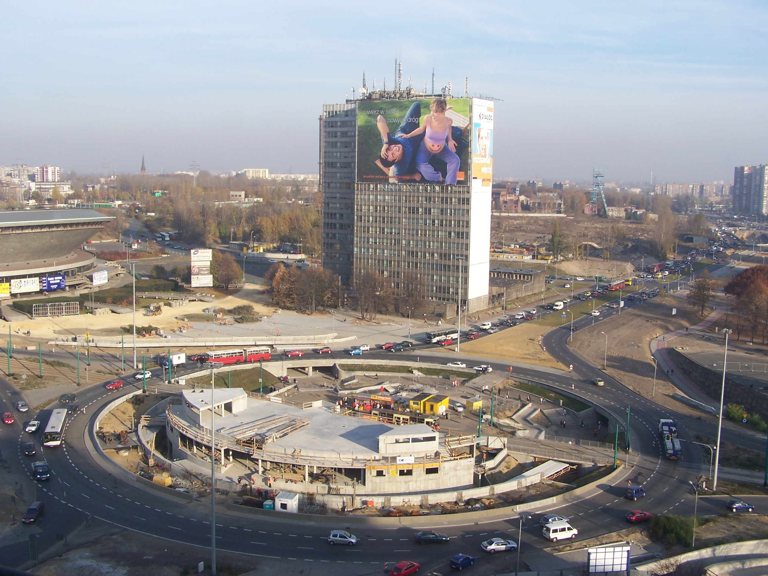 Budowa Drogowej Trasy Średnicowej. Wznoszenie kopuły na Rondzie w Katowicach.